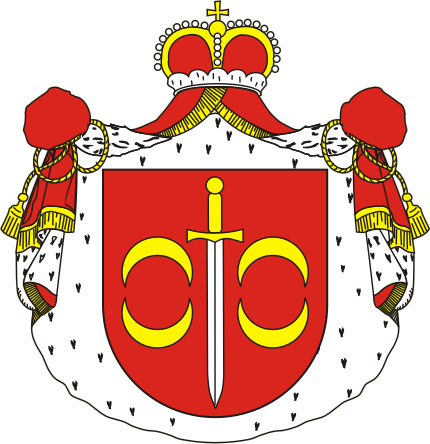 Druck Clan